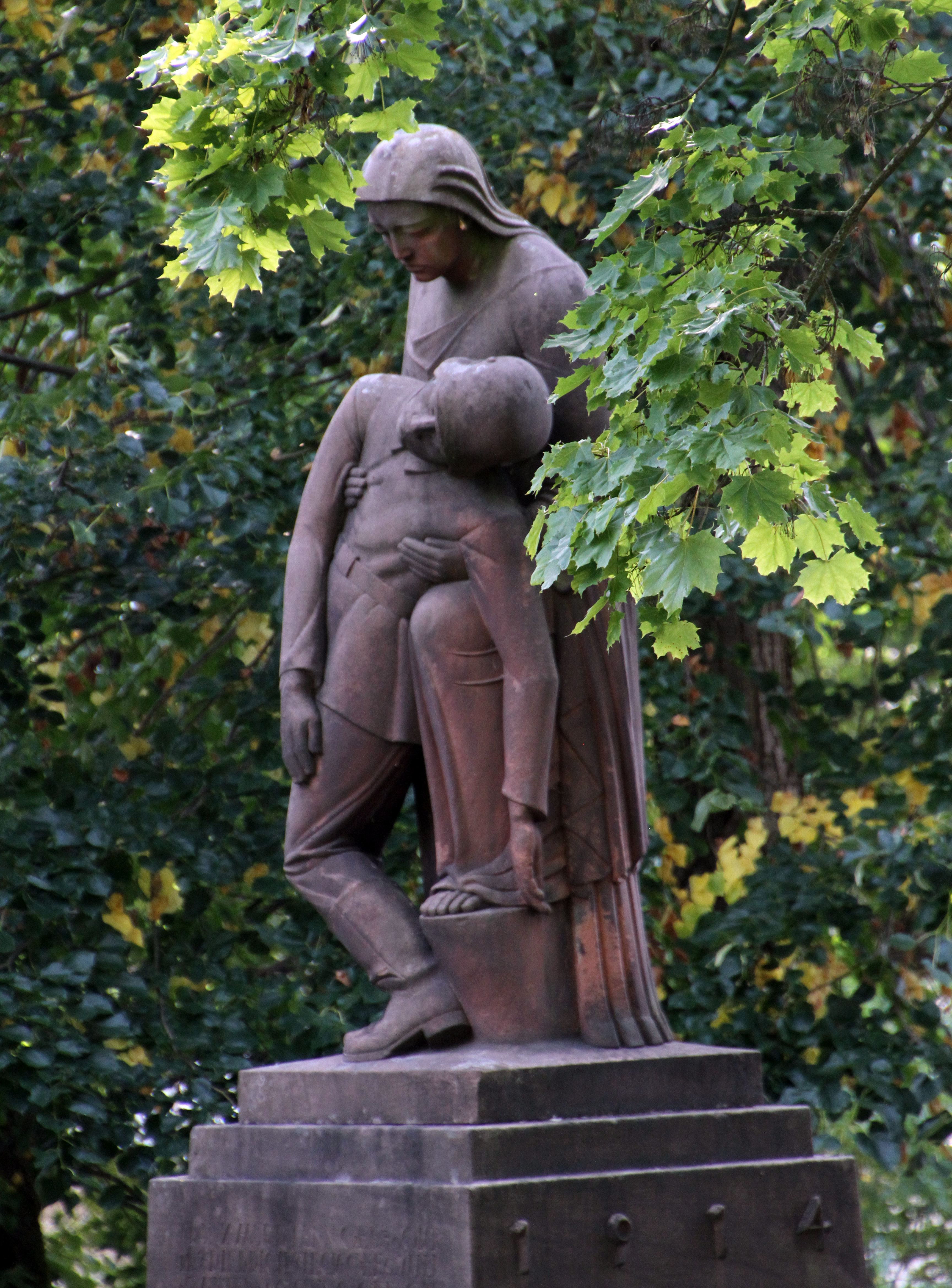 Schopp, Friedhof; Kriegerdenkmal 1914/18, 1920er Jahre, Figurengruppe.